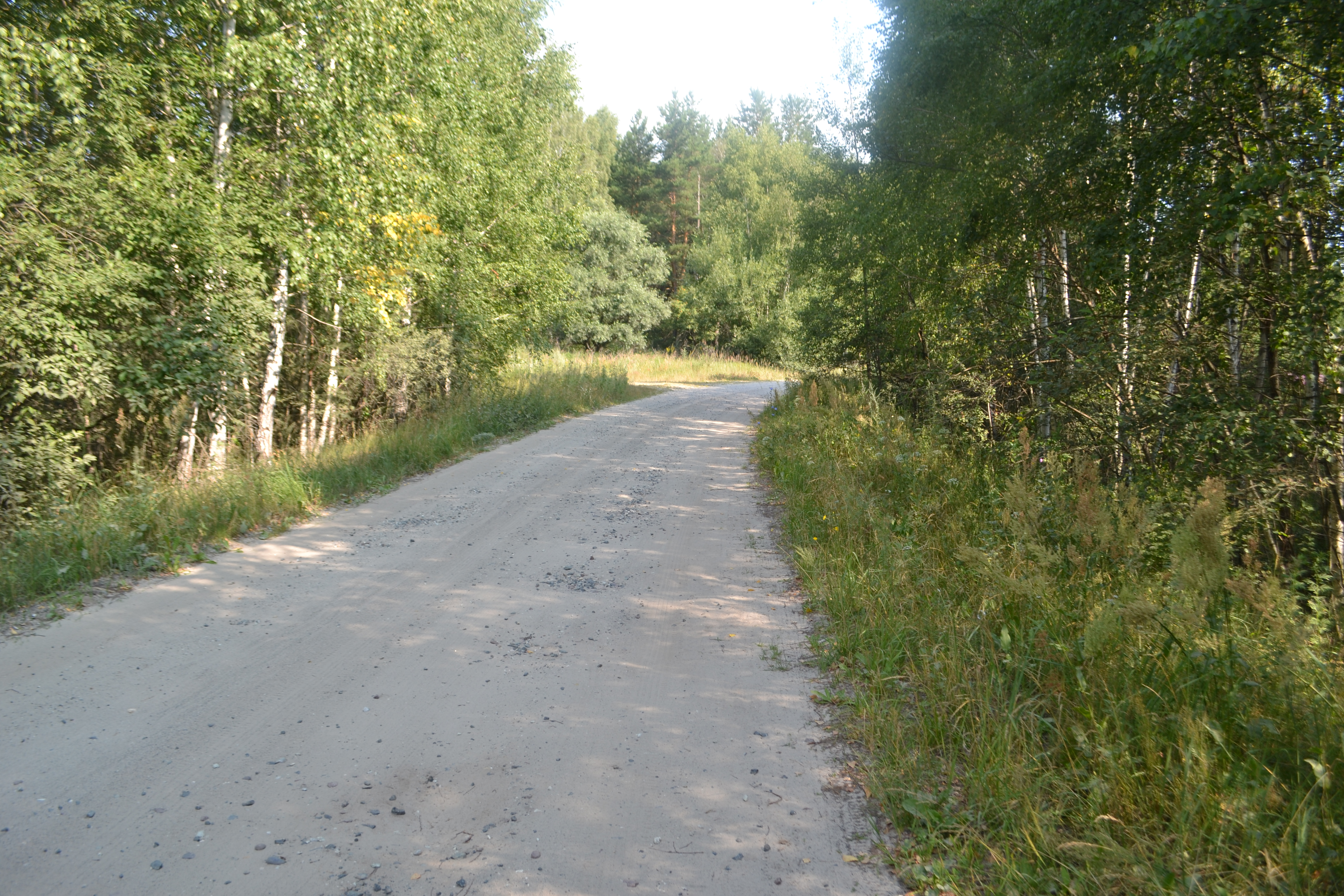 Дорога в деревню Ловчиково (Шатурский район)